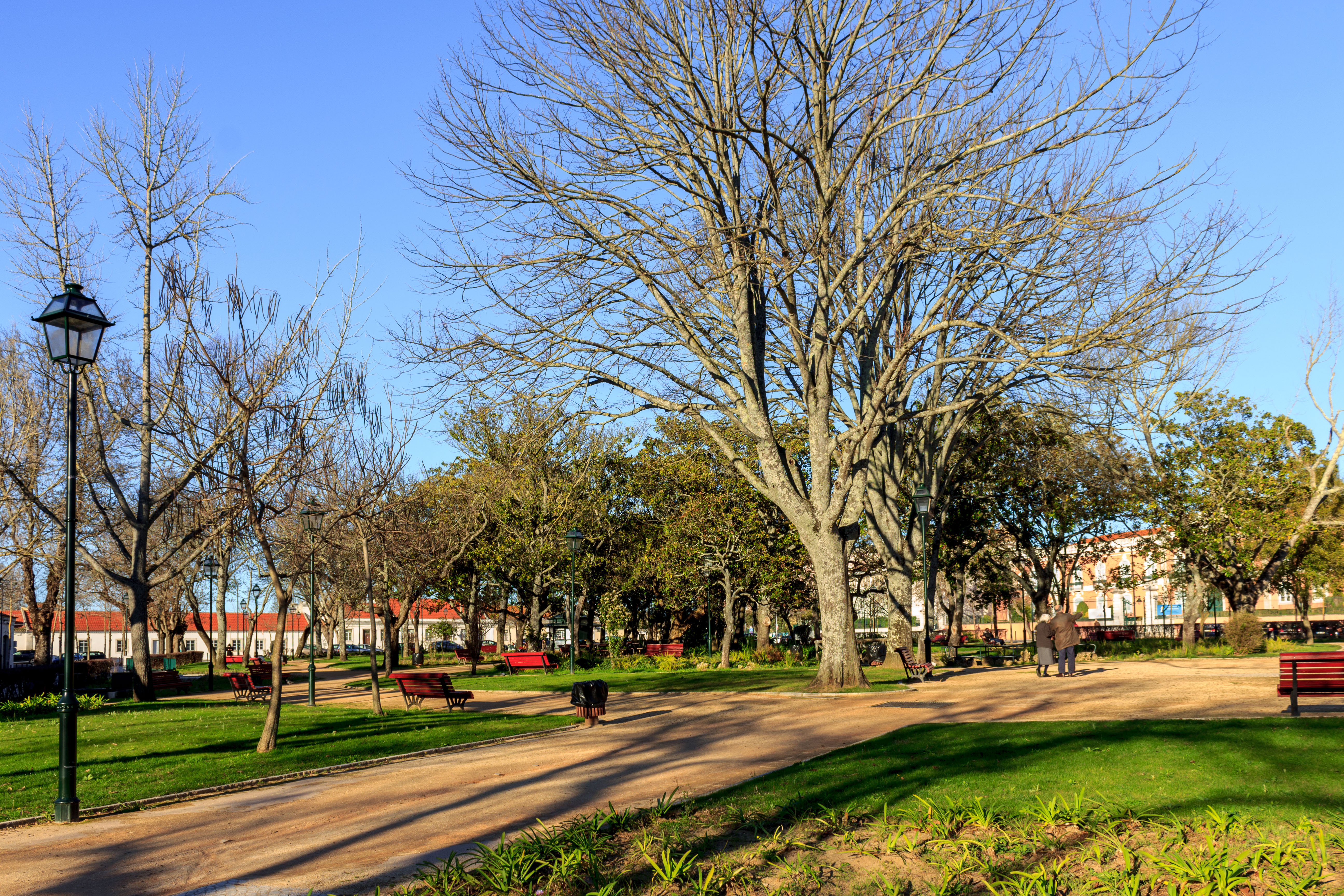 Largo da Luz, em Lisboa